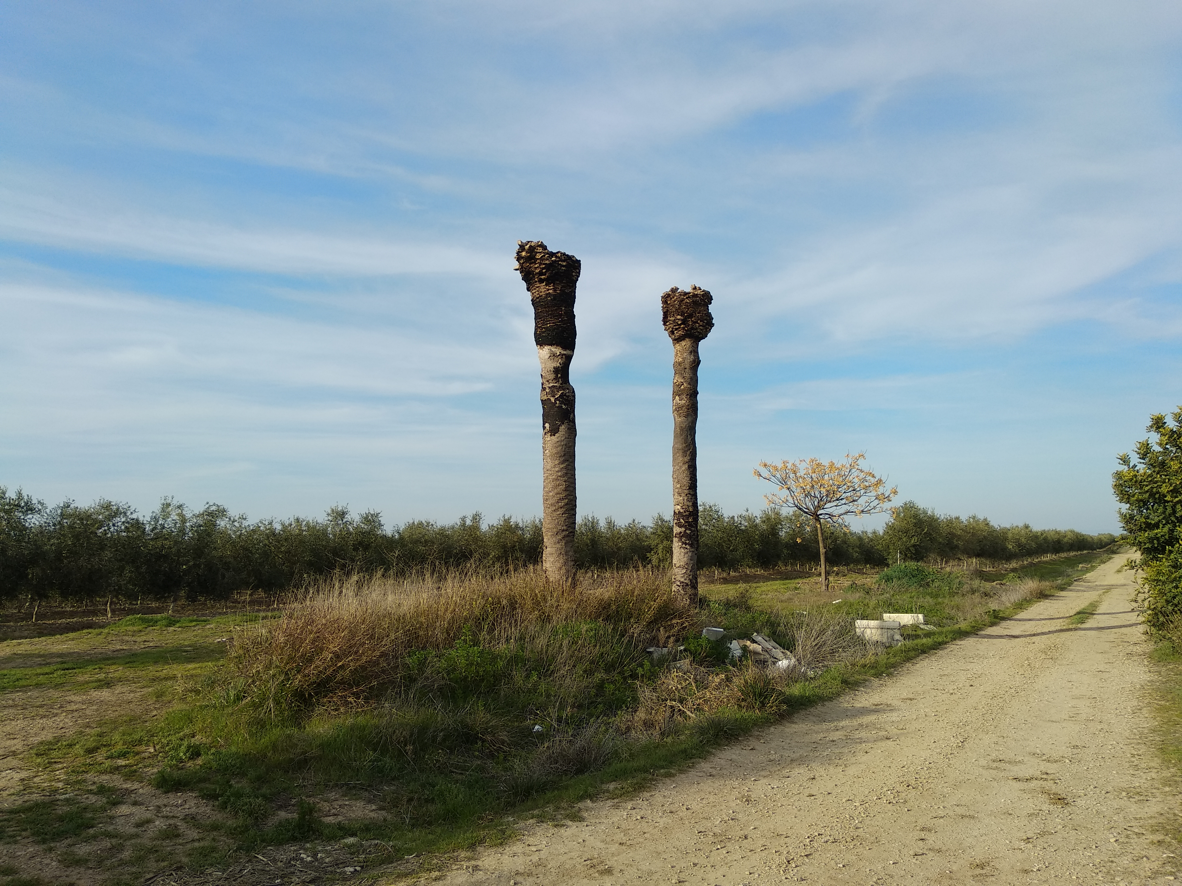 Emplazamiento de la antigua estación de Fuente Palmera en el paraje de Navalagrulla en Écija (Sevilla, España)